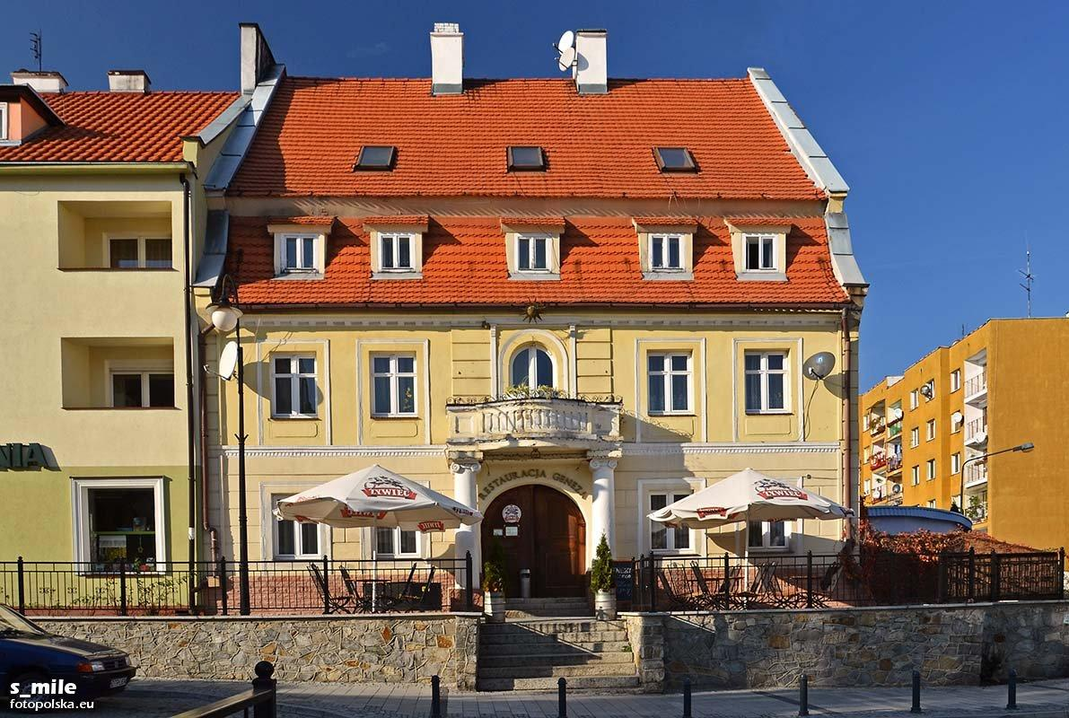 Trzebnica, Rynek 8 - kamienica, w latach 1998-2008 "Muzeum Regionalne, obecnie restauracja "Geneza"(zabytek nr A/3876/1721 z 20.06.1966)